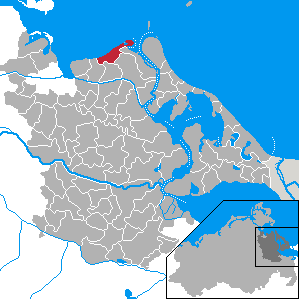 Lubmin, Landkreis Ostvorpommern, Mecklenburg-Vorpommern